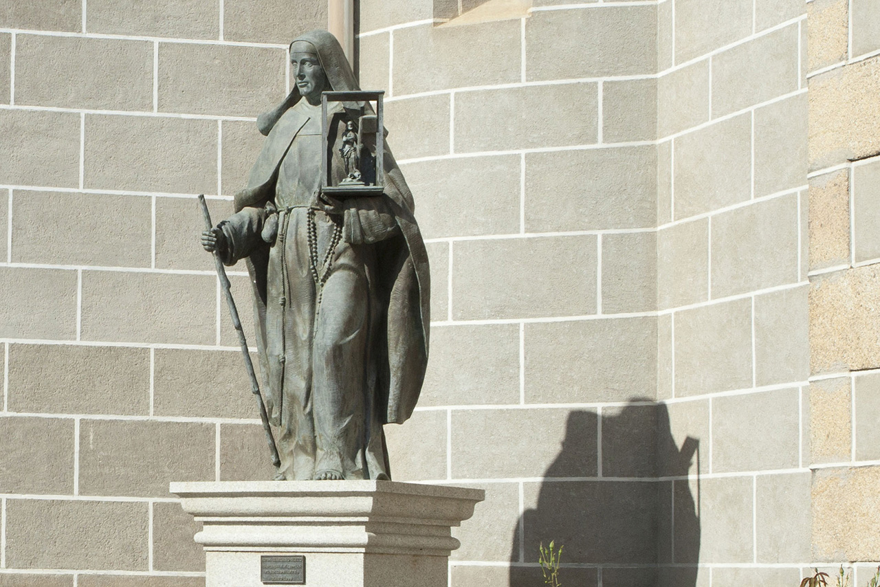 Beata Francisca de Oviedo y Palacios.